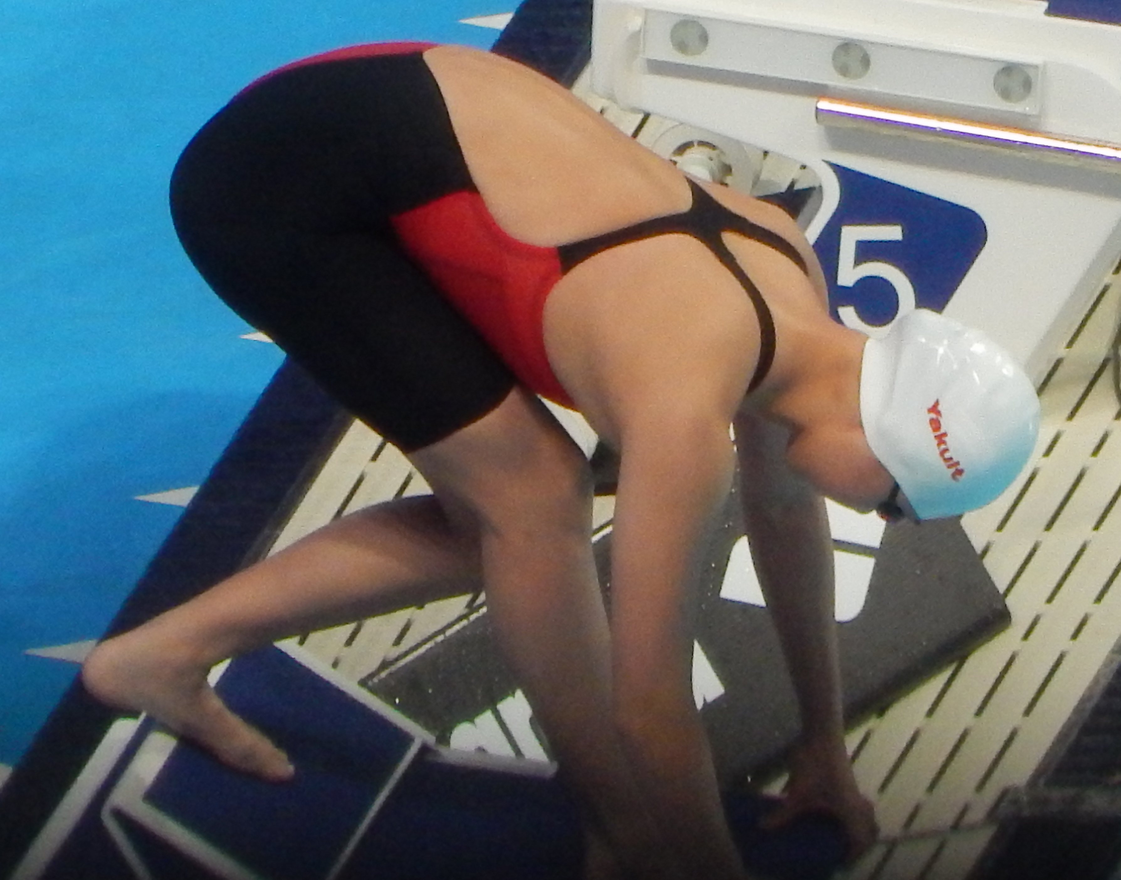 Чжань Юфэй на чемпионате мира в Казани